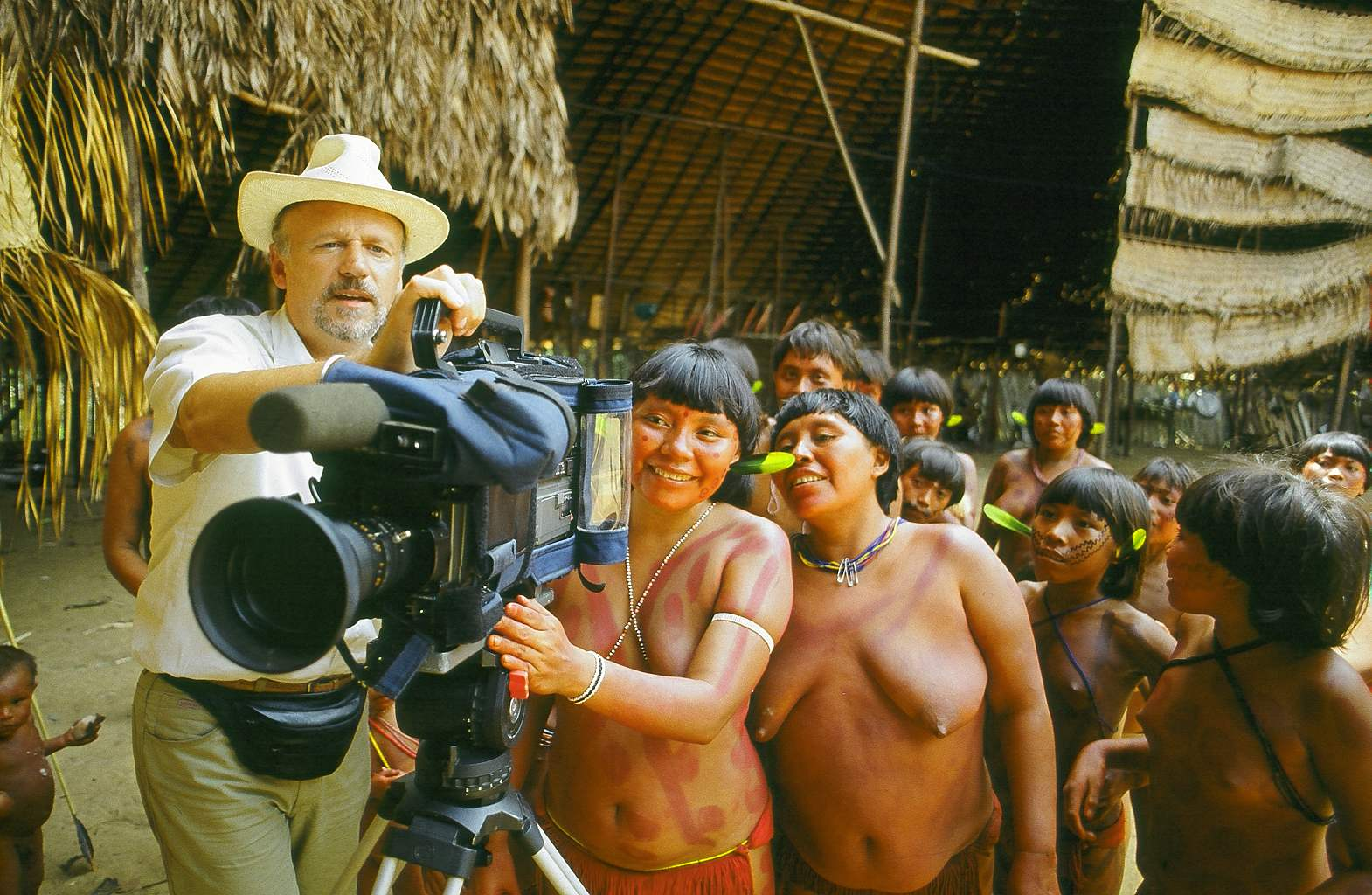 Leigheb Maurizio con telecamera